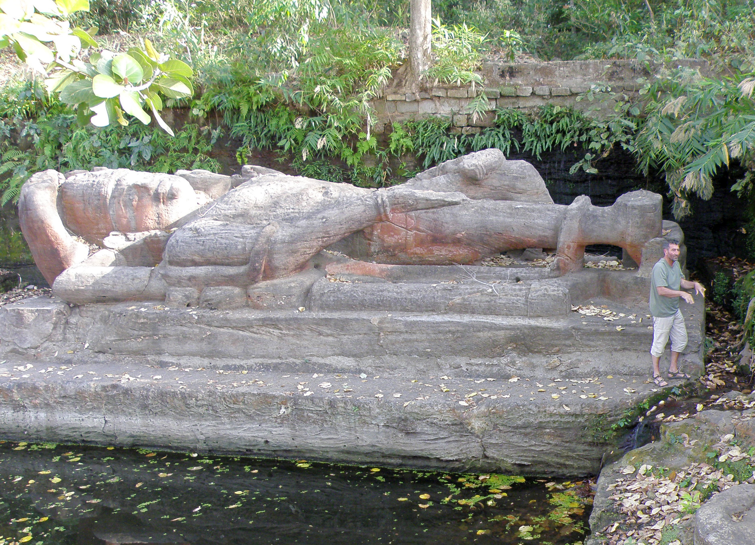 Statue de Shesh Shaiya (Vishnou couché) dans le Parc National de Bandhavgarh - Madhya Pradesh - Inde